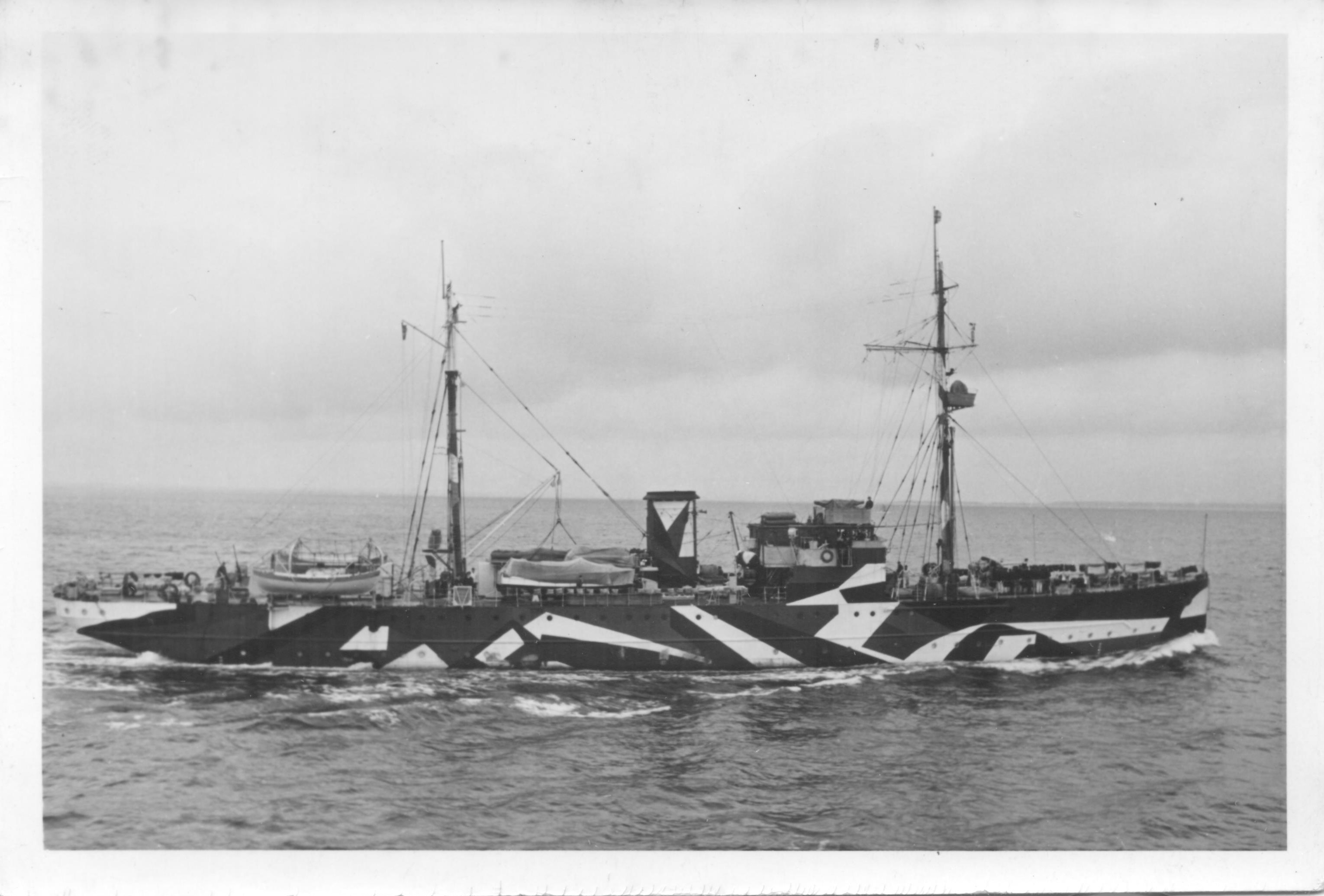 F.S. Meteor im Jahr 1941